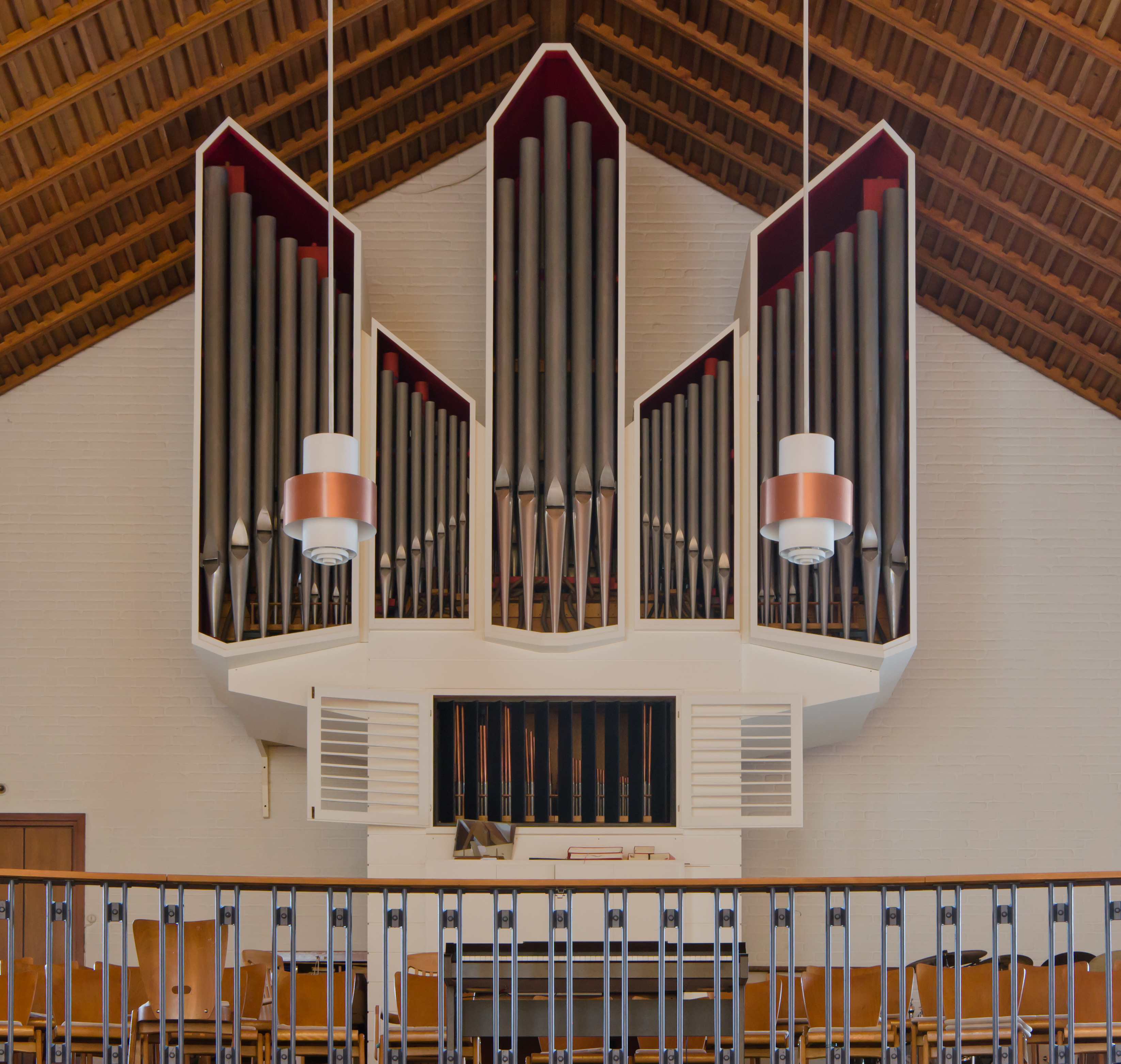 Hamburg Groß Borstel St.Peter Orgel